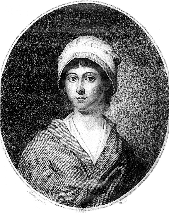 Gravure anonyme de Charlotte Corday, d'après le dessin réalisé le 17 juillet 1793 en fin de journée par Charles-Paul Jérôme de Bréa (1739-1820)